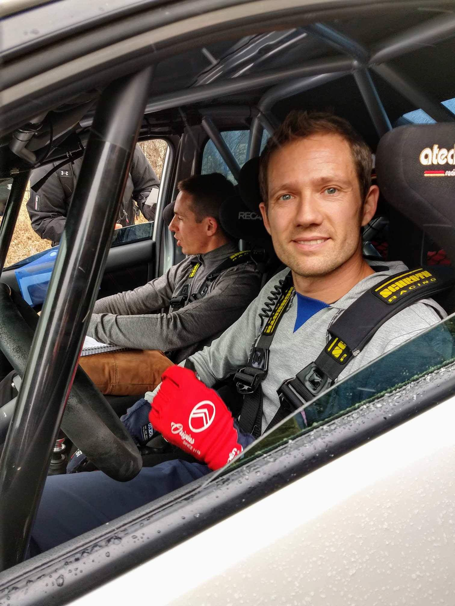 Sébastien Ogier et Julien Ingrassia durant les reconnaissances du Rallye Monte-Carlo 2019.